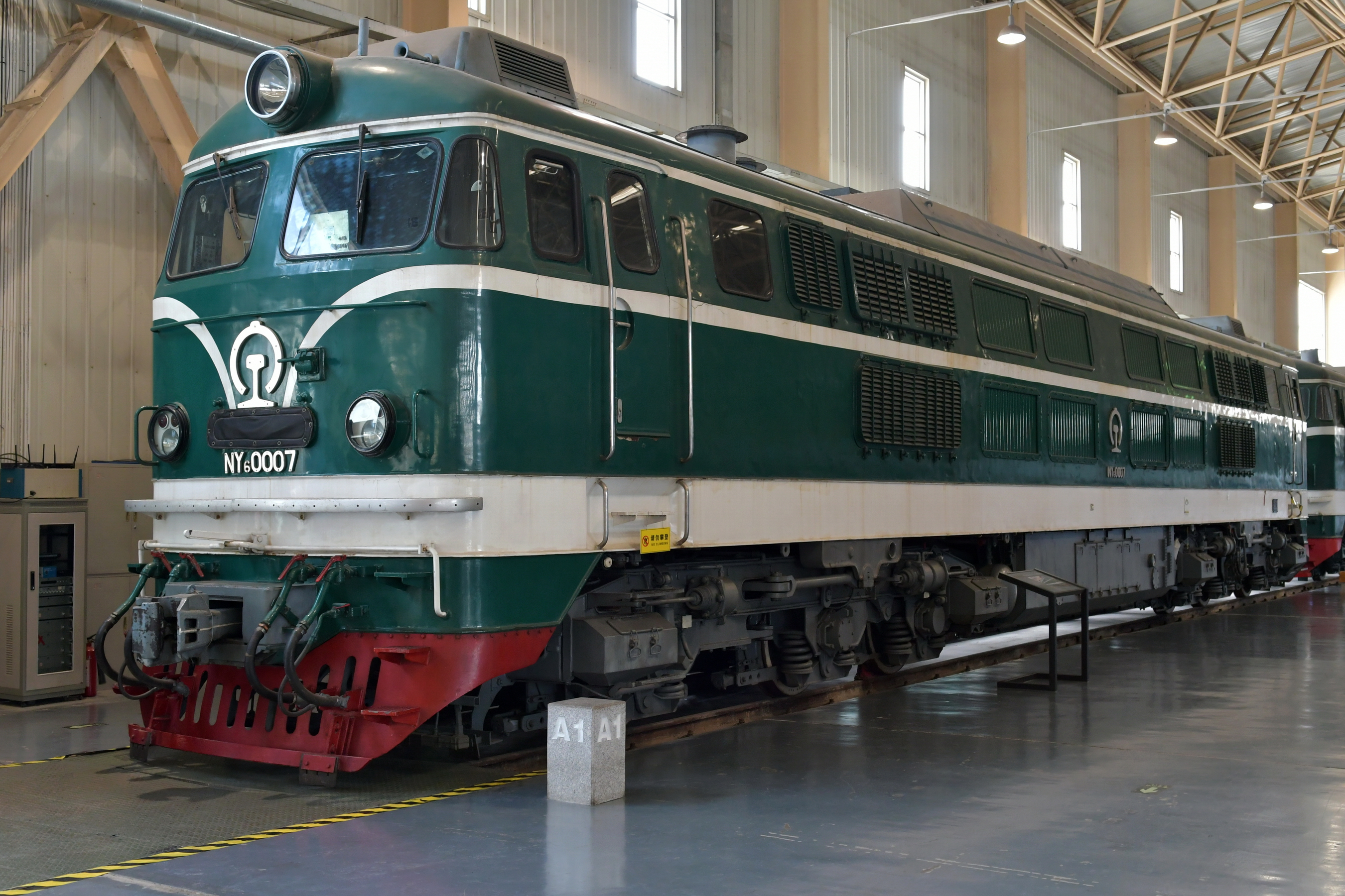 NY6型0007号机车，曾配属铁道部专运处，退役后保存在中国铁道博物馆。